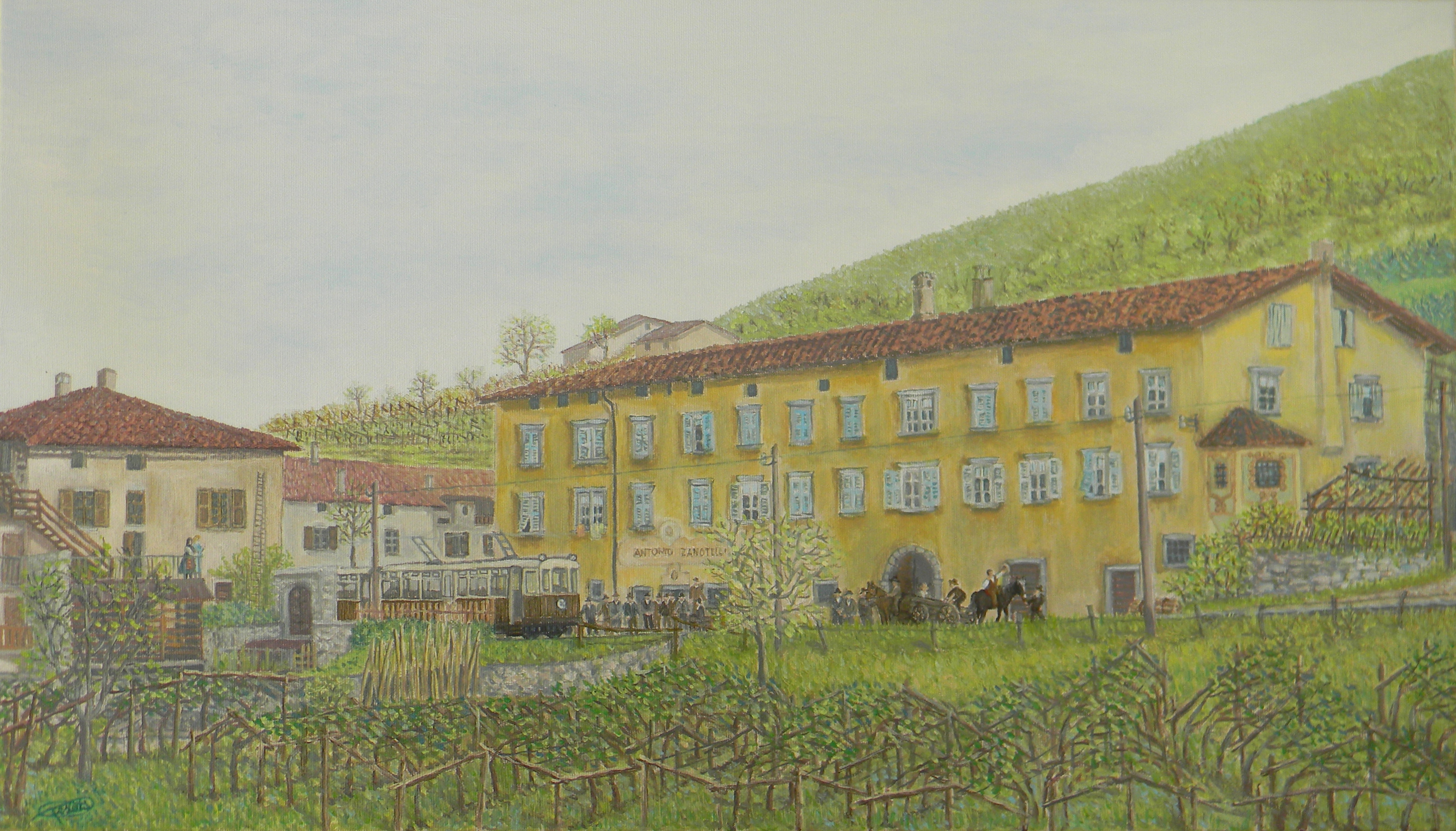 Scena dell'inaugurazione della prima tratta della Ferrovia Trento Malè, situata nella frazione Nave San Felice di Lavis nel 1909, ritratta dal Maestro d'Arte Renato Restelli